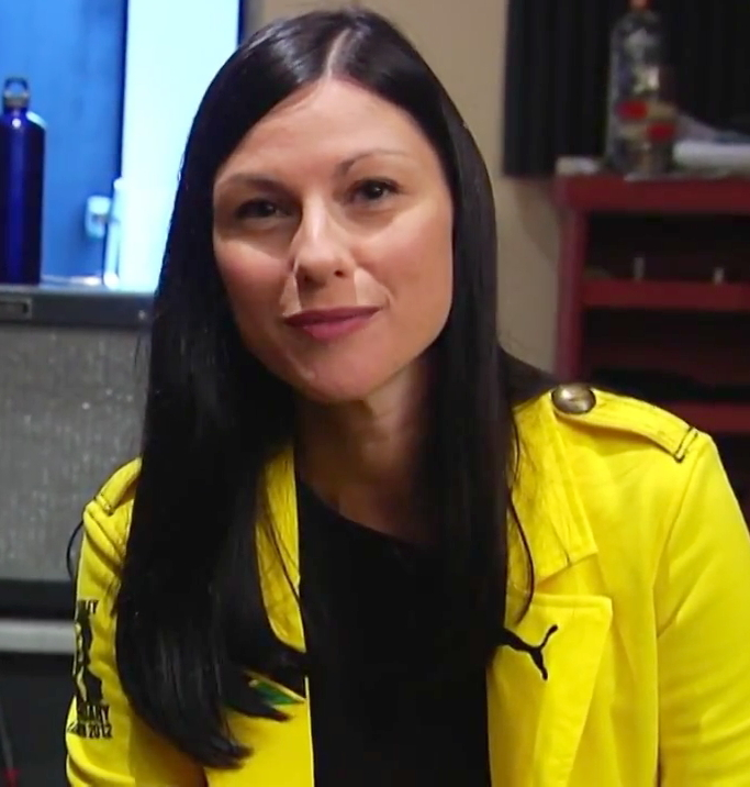 Helena Miquel, cantant, actriu i periodista